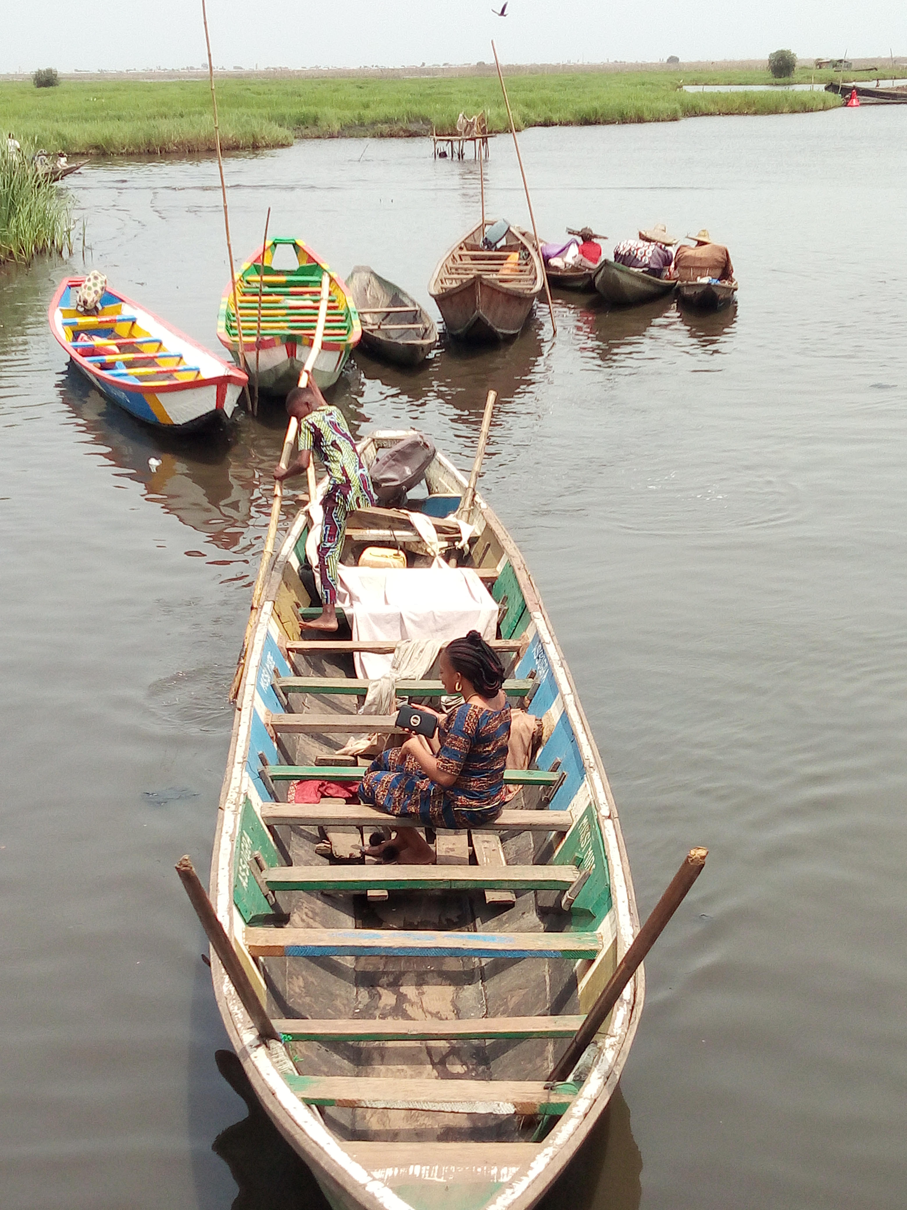 Français cadien: Transport par les pirogues sur le lac Nokoué. Ce type de transport permet au habitants des villages lacustre (Ganvié- Sô Ava- Sô-Tchanhoué) de se déplacer à travers les barques motorisée ou non vers le marché international du Bénin appelé Dantokpa ou soit vers l'embarcadère de Calavi Kpota. This is an image with the theme "Africa on the Move or Transport" from: Benin